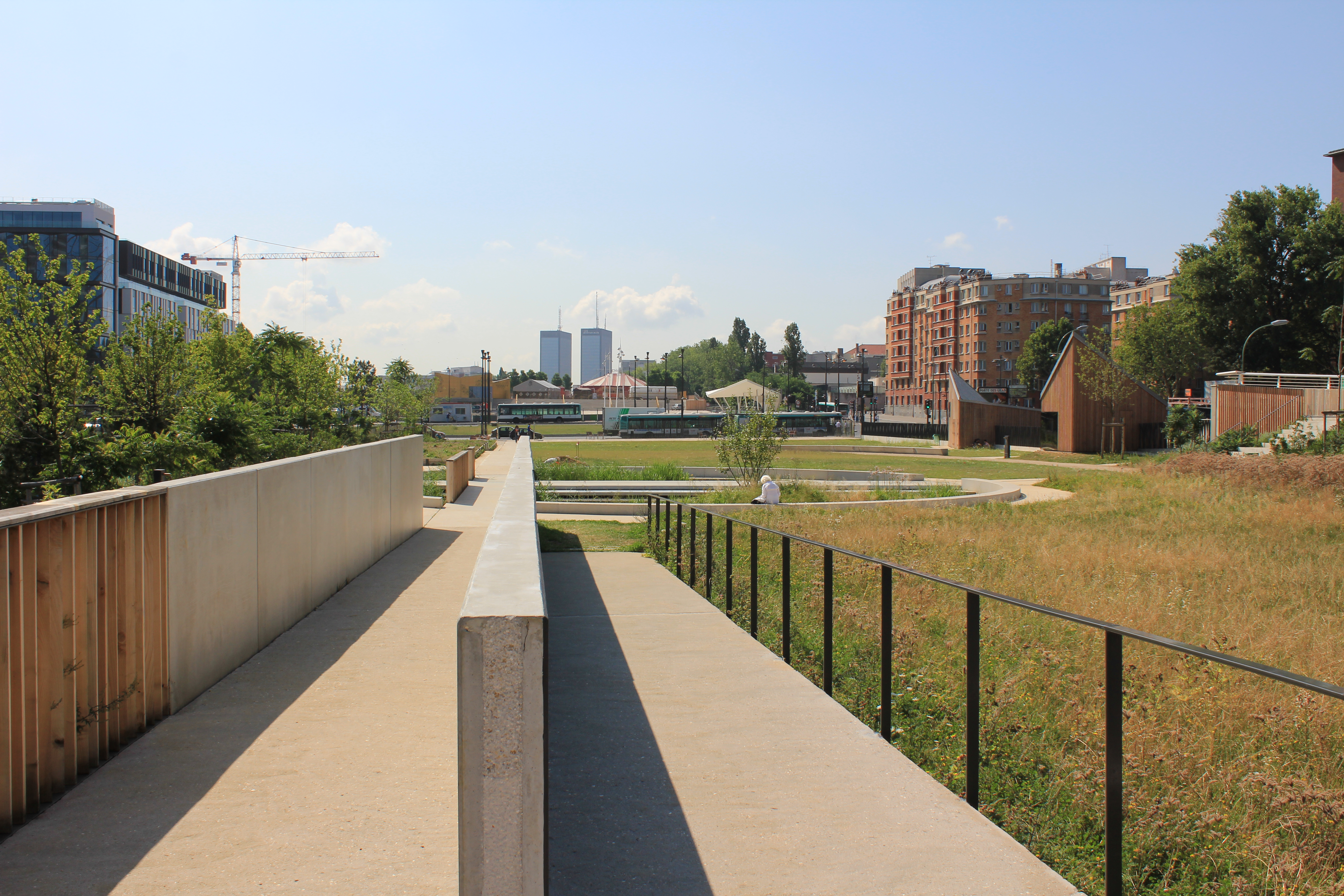 Jardin Serge-Gainsbourg, dans le 19e arrondissement de Paris.